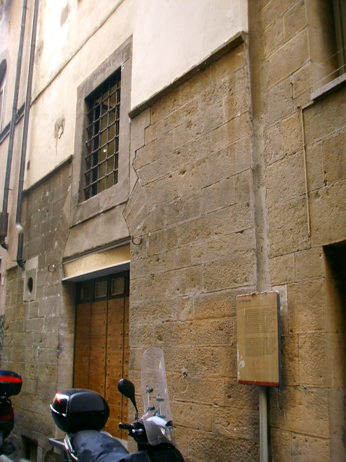 Ex sinagoga d'oltrarno